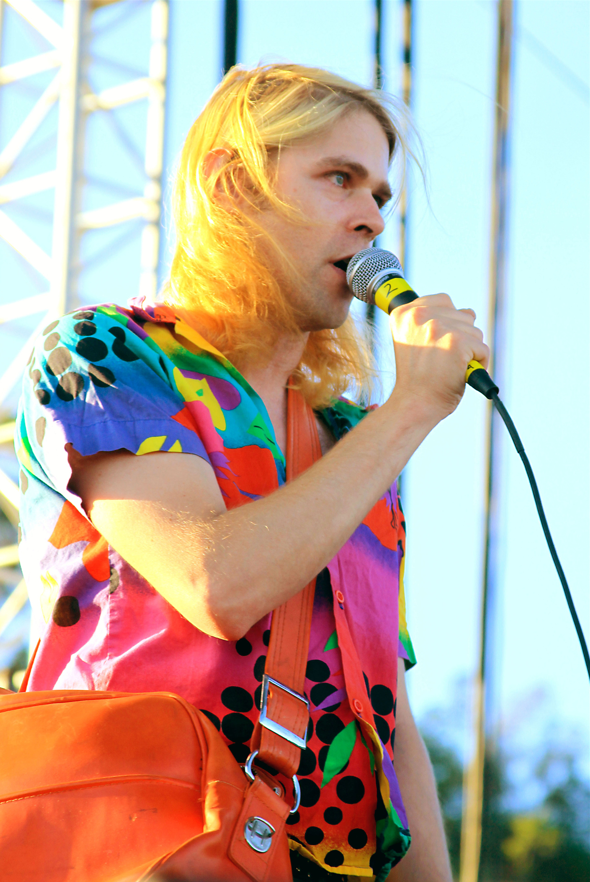 Ariel Pink's Haunted Graffiti FYF 2010